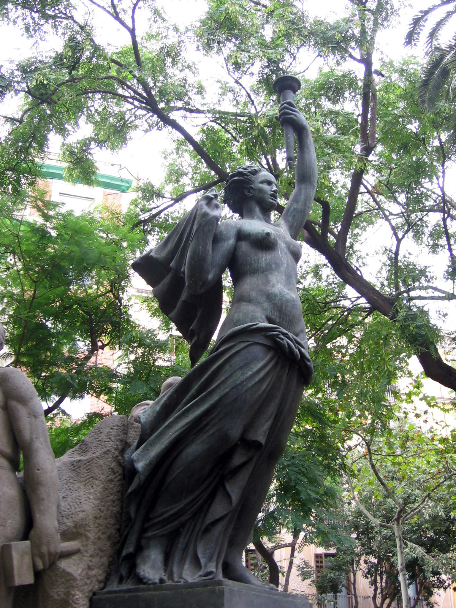 A Francesc Layret (Frederic Marès).